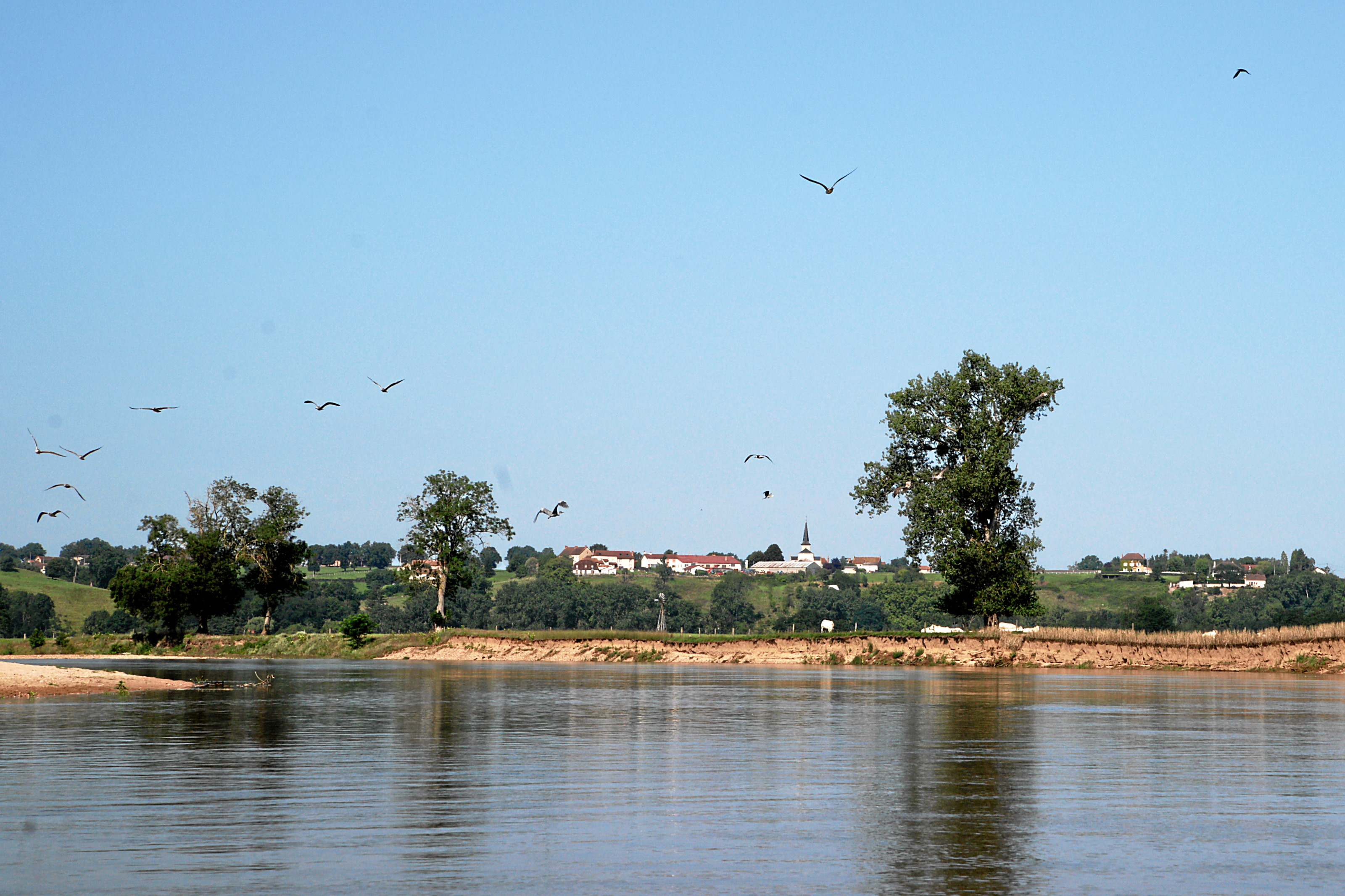 Loire vor Avrilly: Rinder